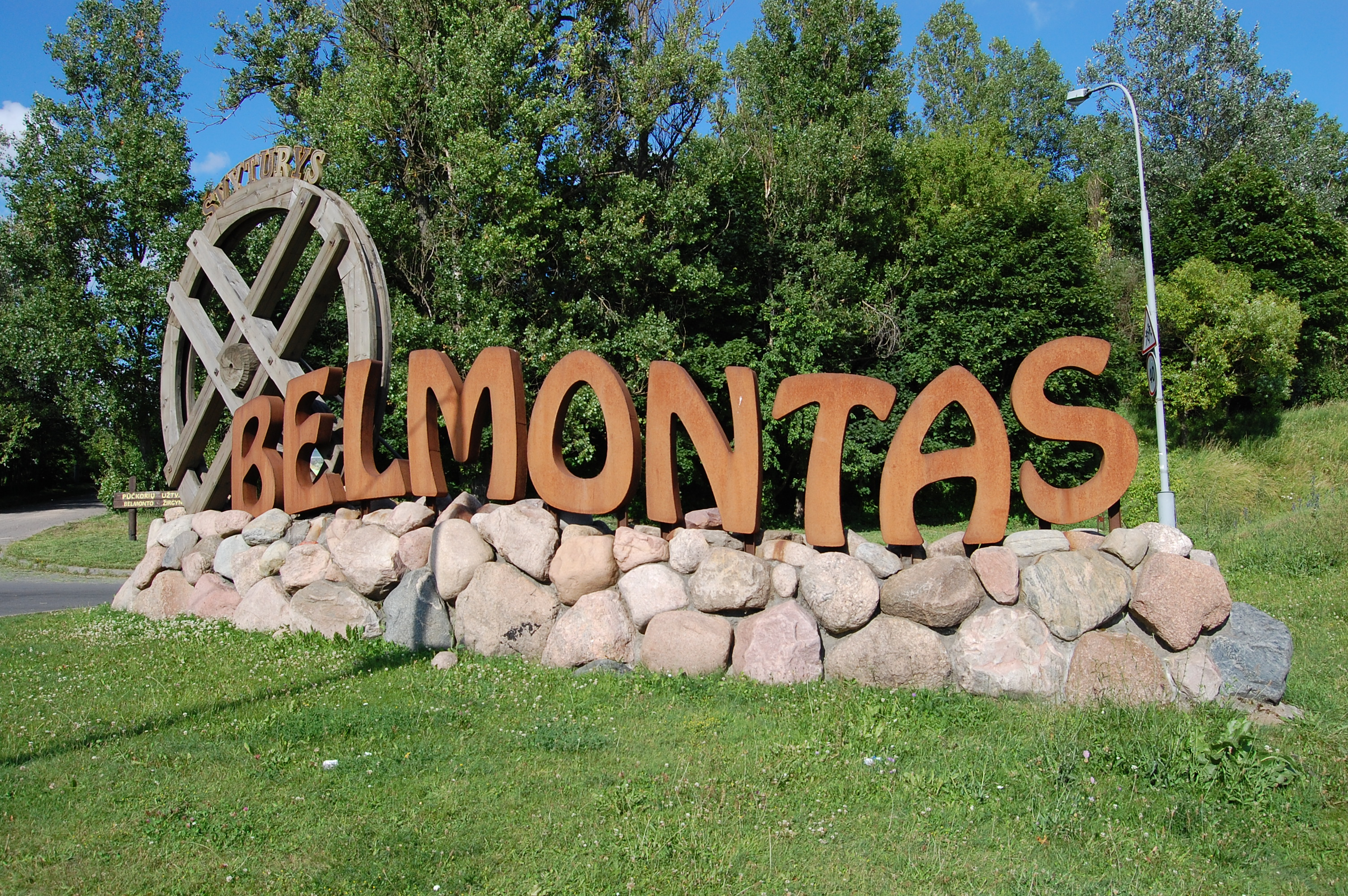 Užrašas pasitinkantis prie įvažiavimo į Belmontą.